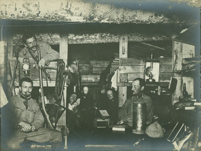 Снимка на австро-унгарски войници във вътрешността на своето укрепление в Тирол, по време на почивка.